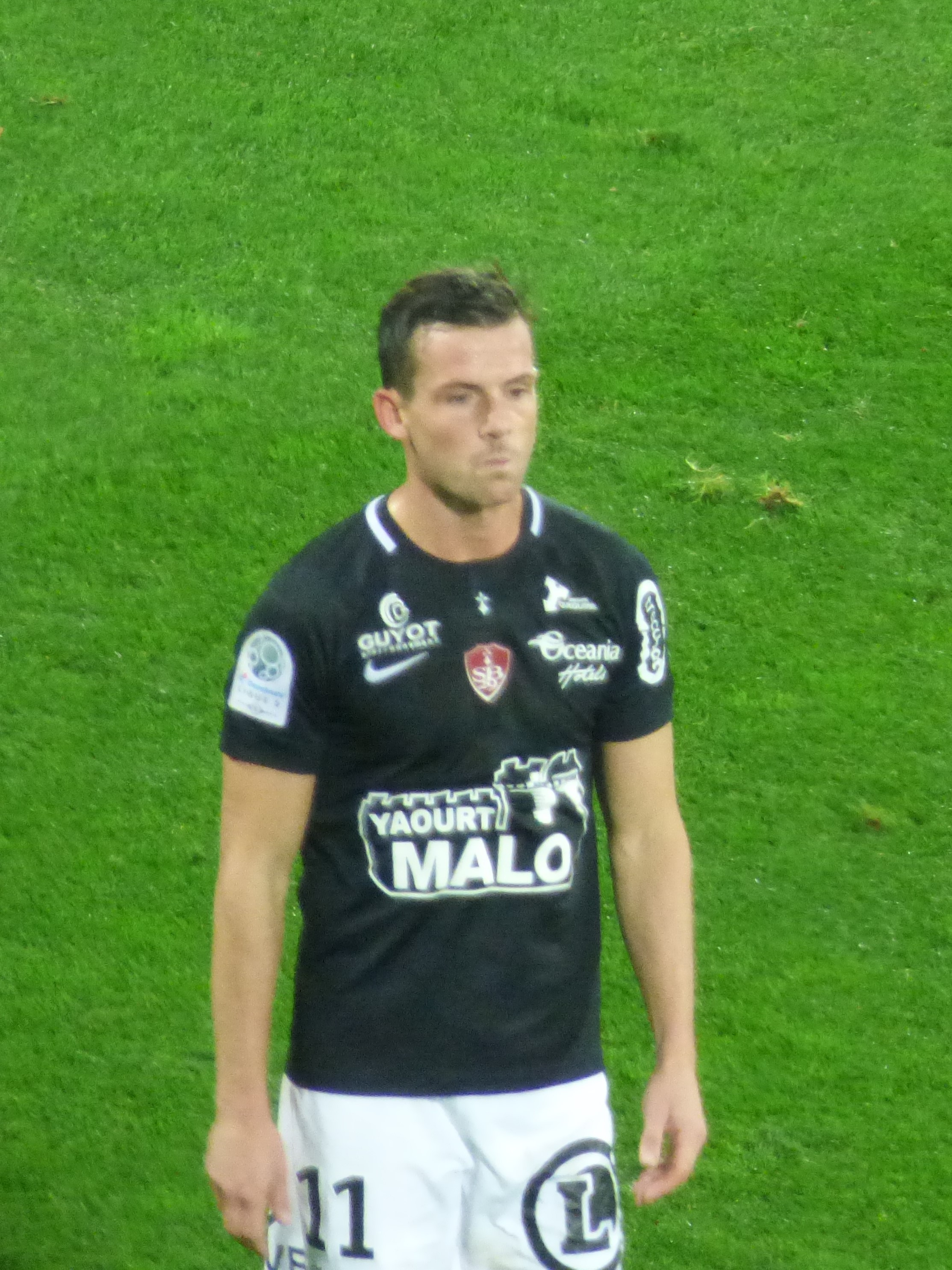 Edouard Butin après le match RC Lens / Stade brestois, le 4 décembre 2018, comptant pour la dix-septième journée du championnat de France de football de Ligue 2 2018-2019, au Stade Bollaert-Delelis.